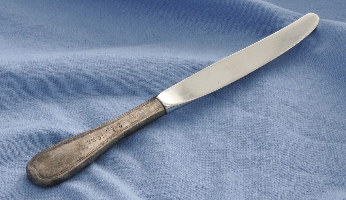 Dessertkniv i stål med skaft i nysølv, produsert på Th. Marthinsen Sølvvarefabrikk. Foto Mekonnen Wolday / Kommandør Chr. Christensens Hvalfangstmuseum, SSJ.01985.